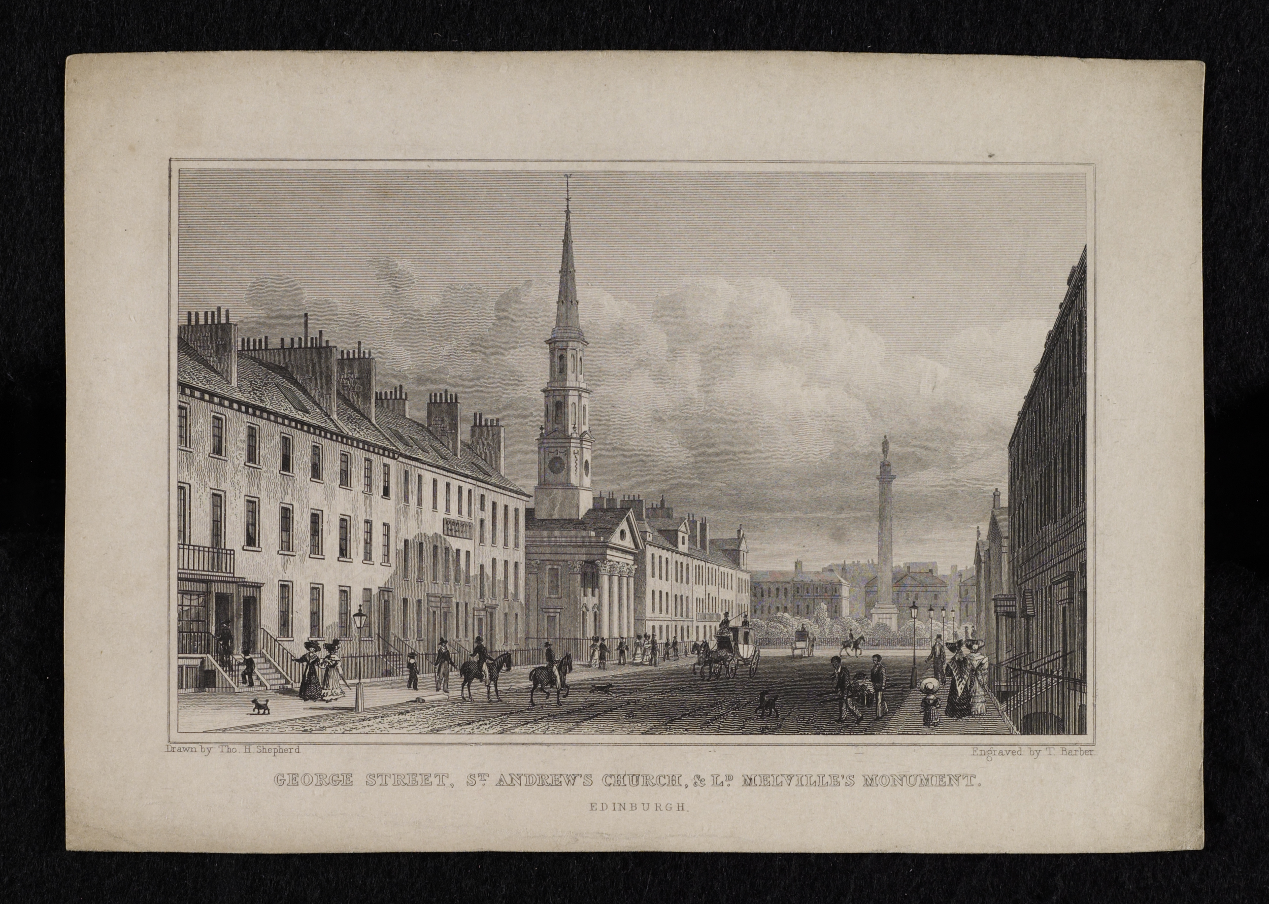 George St, St. Andrew's Church etc., Edinburgh